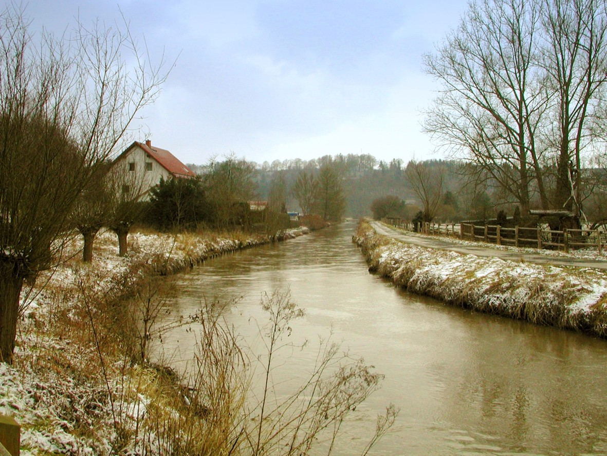 Landgraf-Carl-Kanals in Helmarshausen Quelle: selbst fotografiert Fotograf/Zeichner: presse03 Datum: 12.03.2006